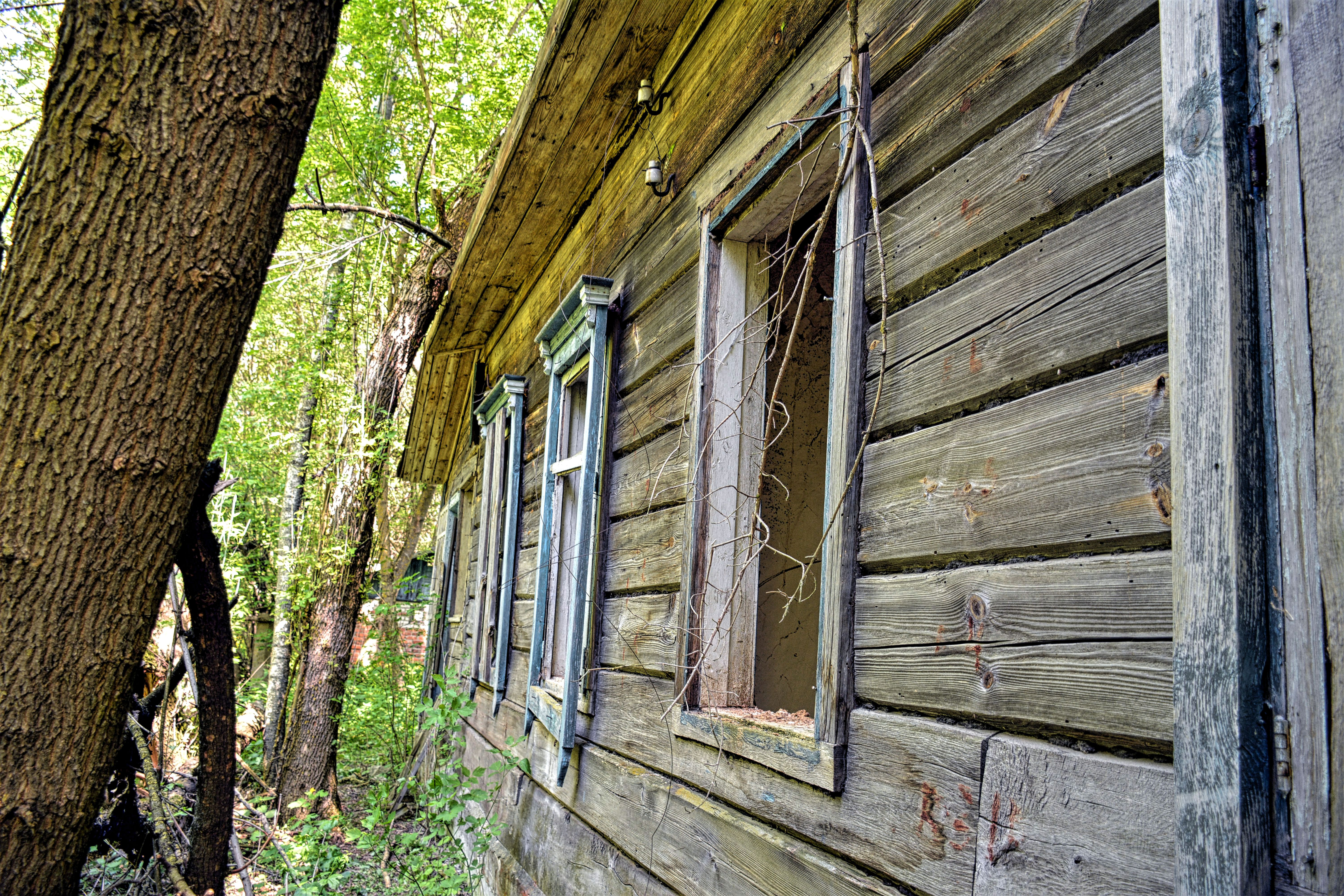 Дом моего детства